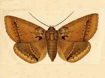 Celiptera cometephora